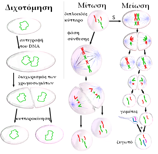 Είδη κυτταρικής διαίρεσης